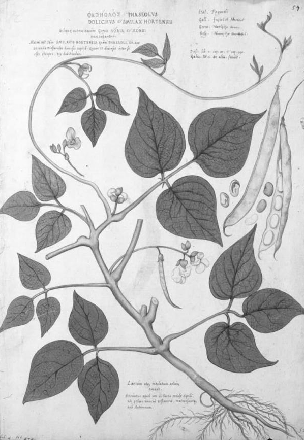 Phaseolus vulgaris: Libri picturati A 23 f. 87